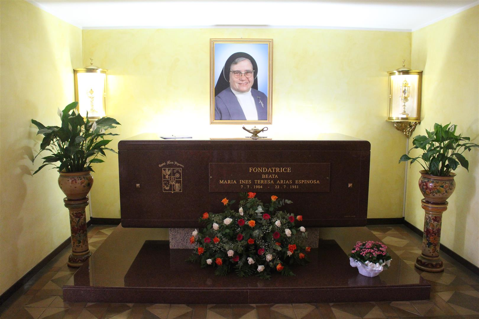 Das Grab der seligen Mutter Maria Inés Teresa vom allerheiligsten Sakrament im Generalat der Missionsklarissen vom alllerheiligsten Sakrament in Rom